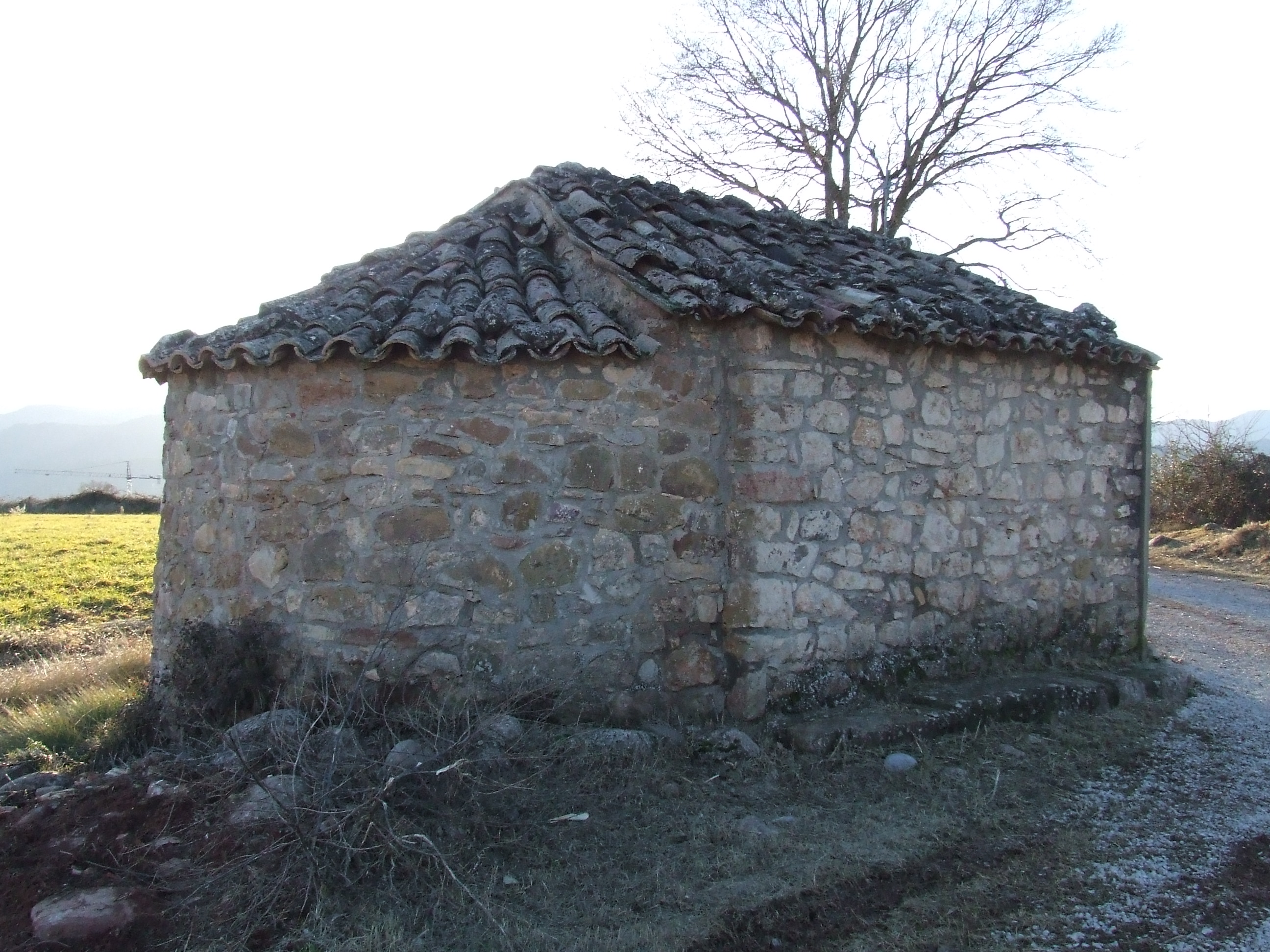 Mur nord de Santa Llúcia de Vilamitjana (Tremp, Pallars Jussà)